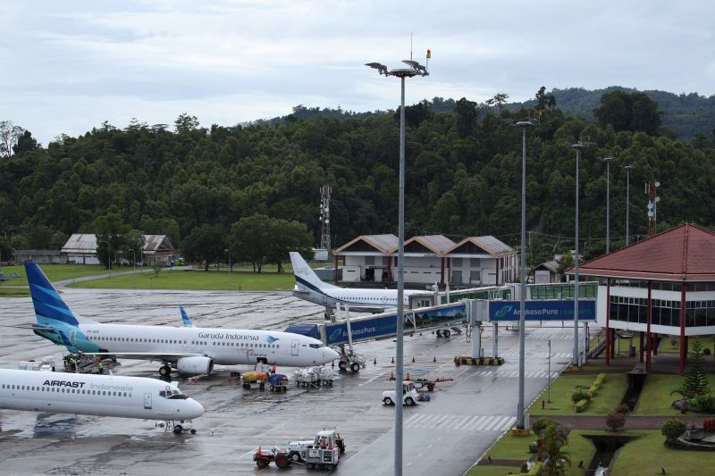 Apron Bandara Pattimura